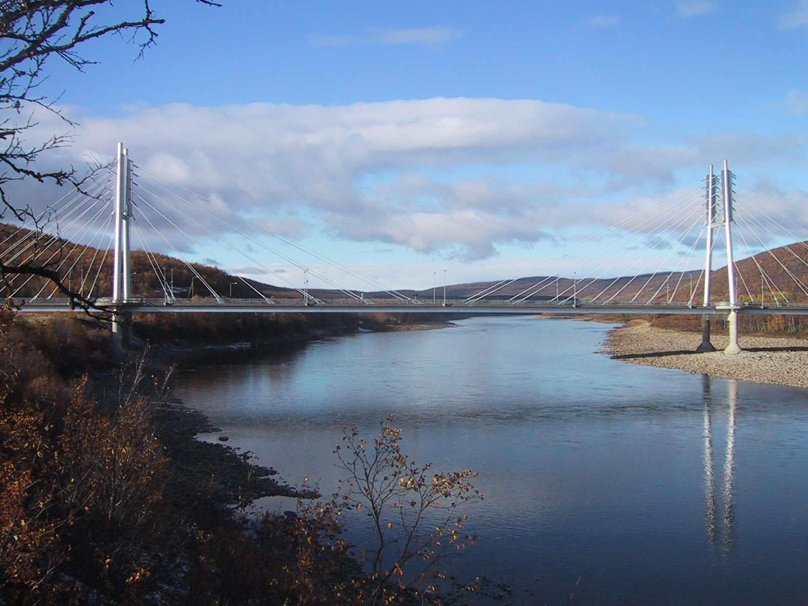 Samelandsbrua over Tanaelva